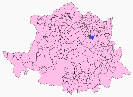 Majadas de Tiétar